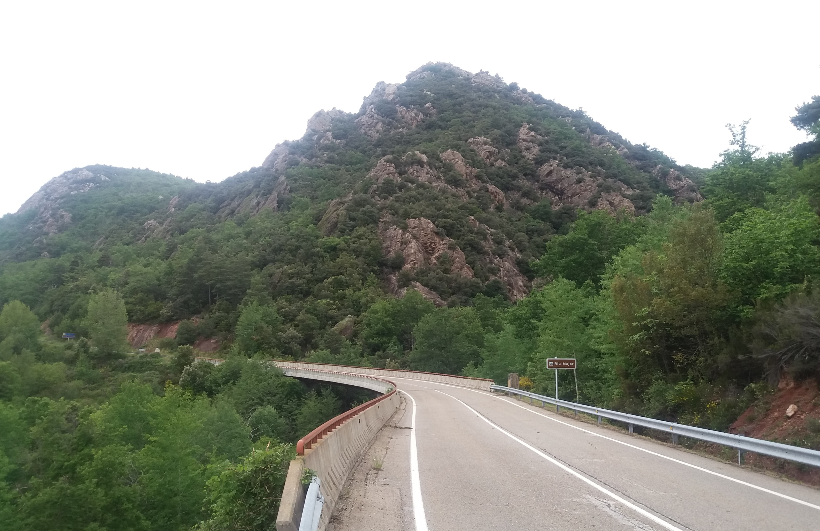 El Roc del Bau de Costoja